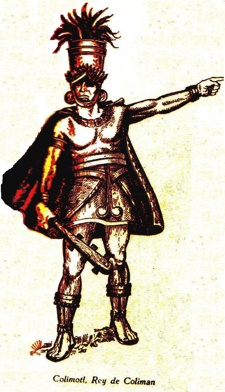 Grabado Histórico del Rey Colimán de la Historia Gráfica de Colima